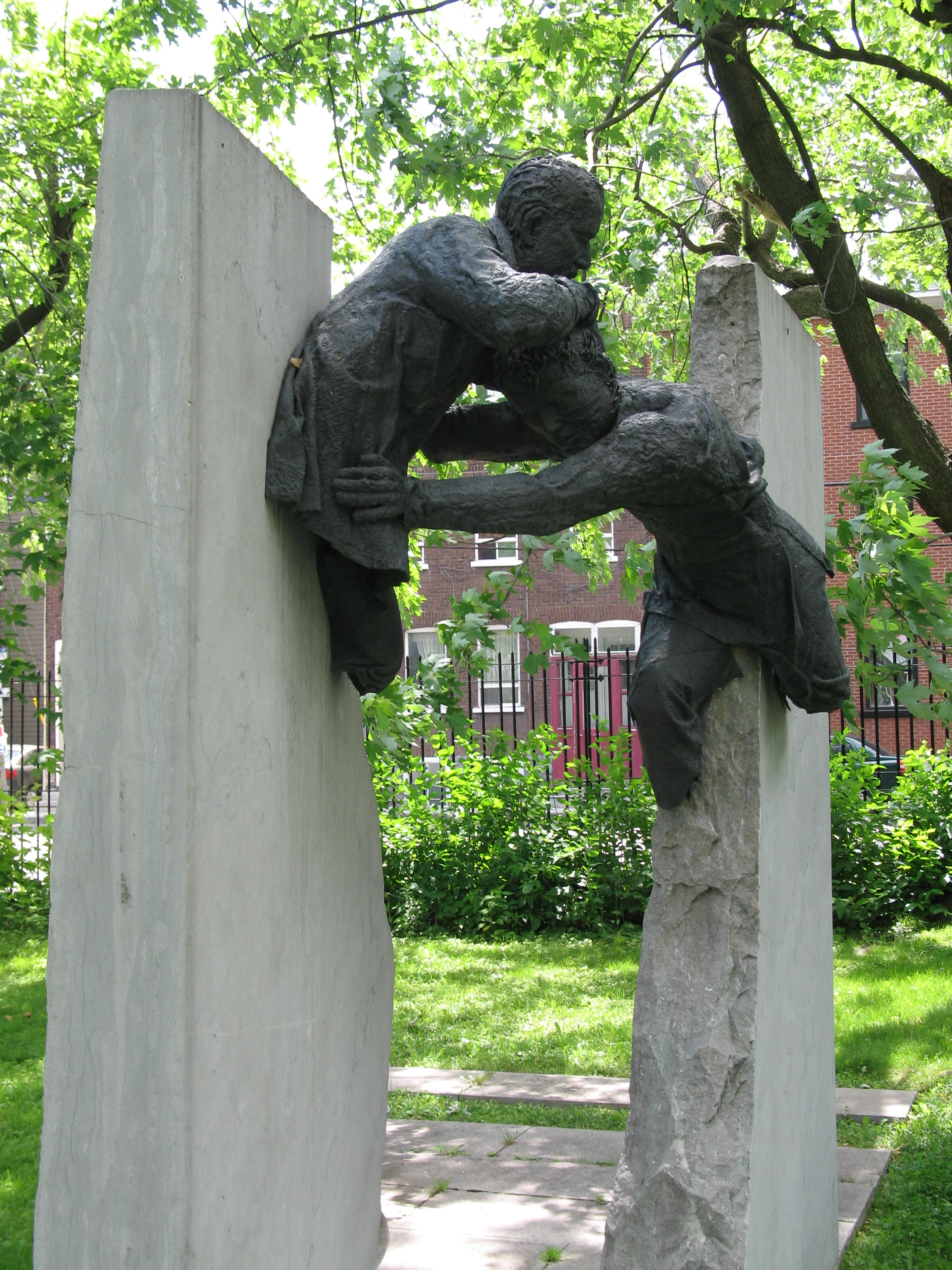 Mémorial de la guerre de Sept Ans dans le cimetière de l'Hôpital-Général de Québec, dans la municipalité enclavée de Notre-Dame-des-Anges. Ensemble commémoratif avec une sculpture de bronze et de pierre intitulée « Traversée sans retour », œuvre de Pascale Archambault, inaugurée le 11 octobre 2001.